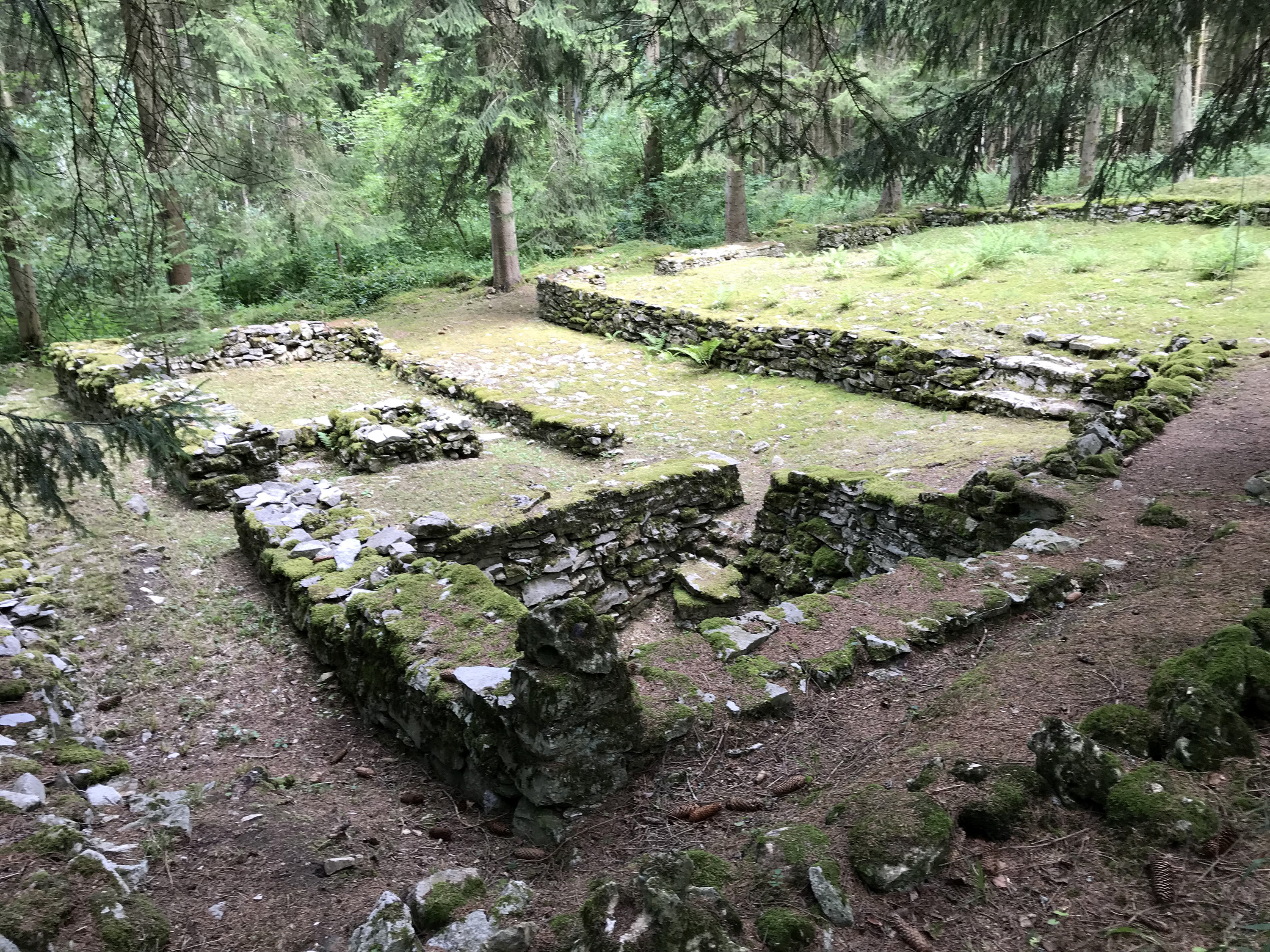 Oberkochen - Grundmauern des Bilzhauses aus nordwestlicher Richtung